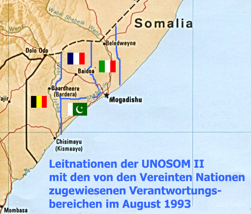 Map of Somalia with responsible areas of the UNOSOM II-Mission, August 1993 Karte von Somlia mit den Leitnationen und den zugewiesenen Vernatwortungsbereichen im Rahmen der UNOSOM II im August 1993